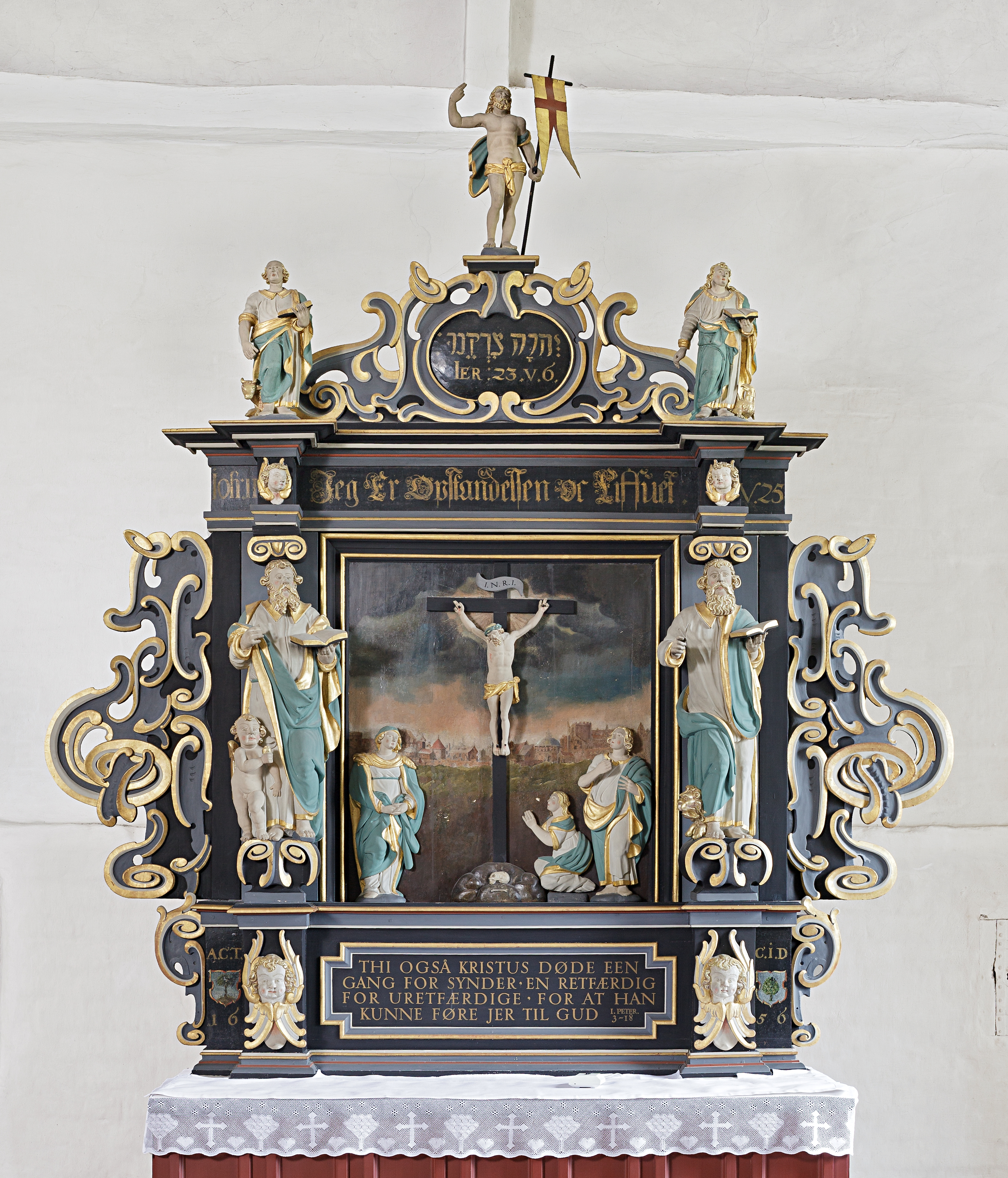 Altertavle Paarup Kirke